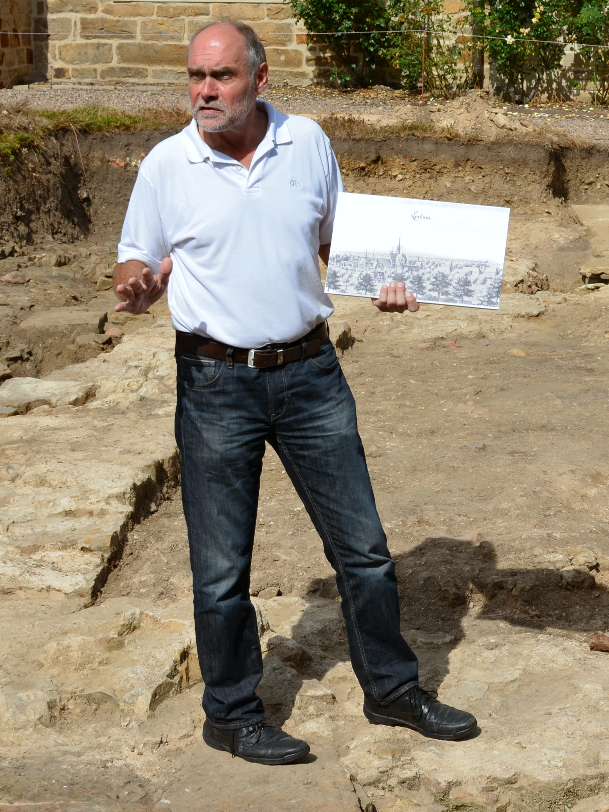 Führung des Bezirksarchäologen Friedrich-Wilhelm Wulf bei der Ausgrabung auf dem Gelände des Klosters Loccum